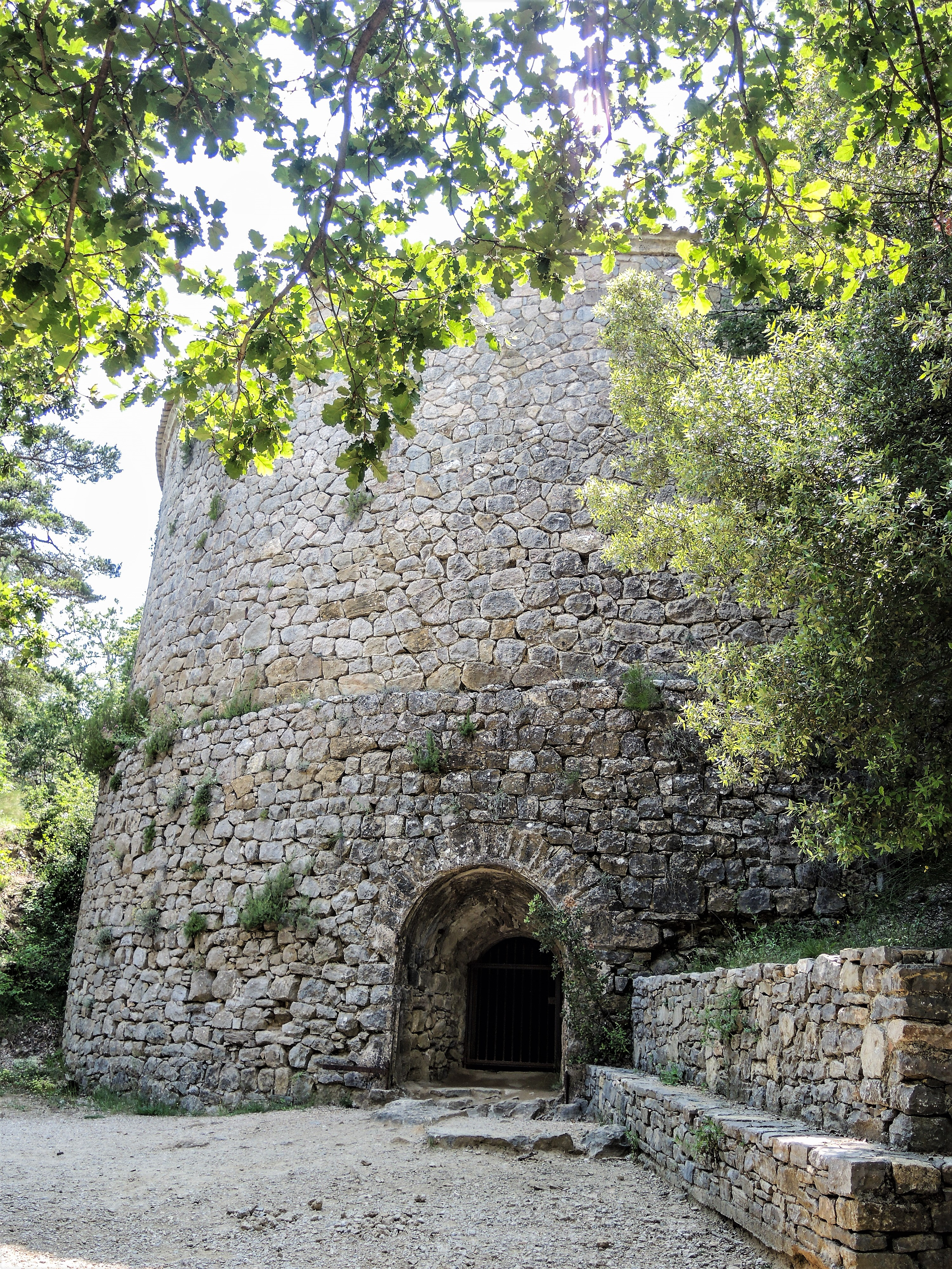 Bâtiment de la glacière Pivaut. (Gaudin). Mazaugues. Var.